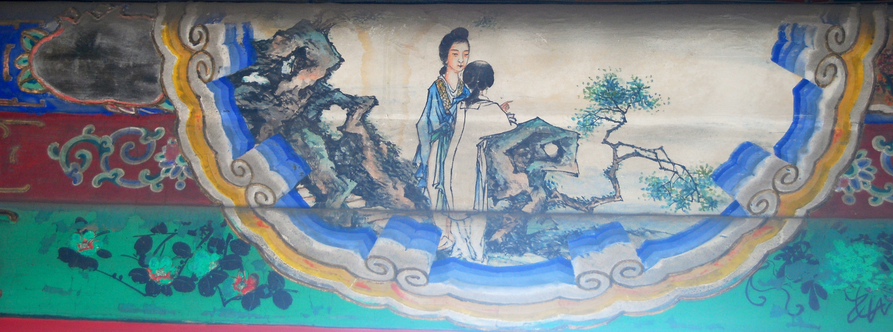 颐和园长廊上的彩绘：傻大姐泄密